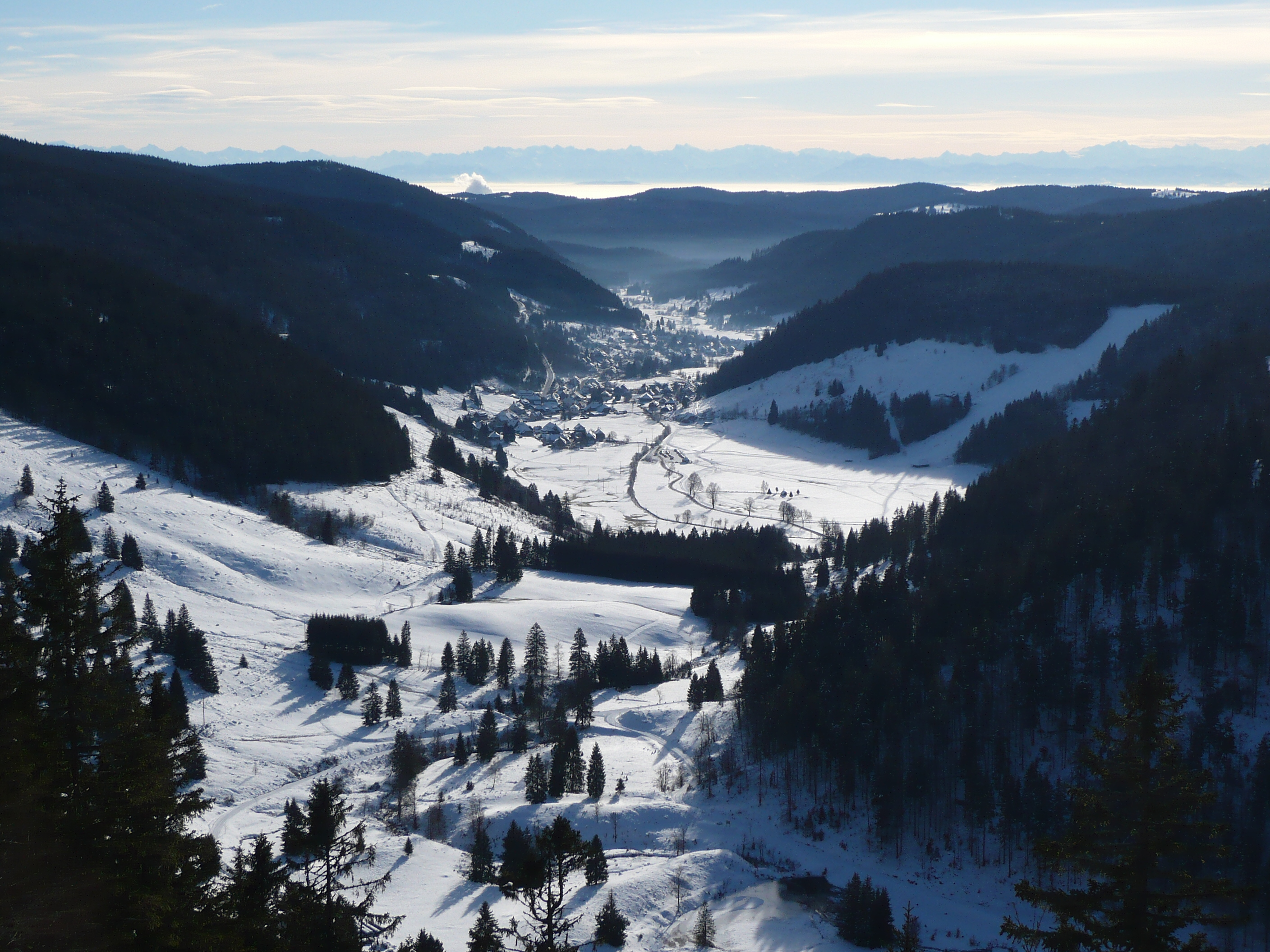 Blick ins Menzenschwander Tal